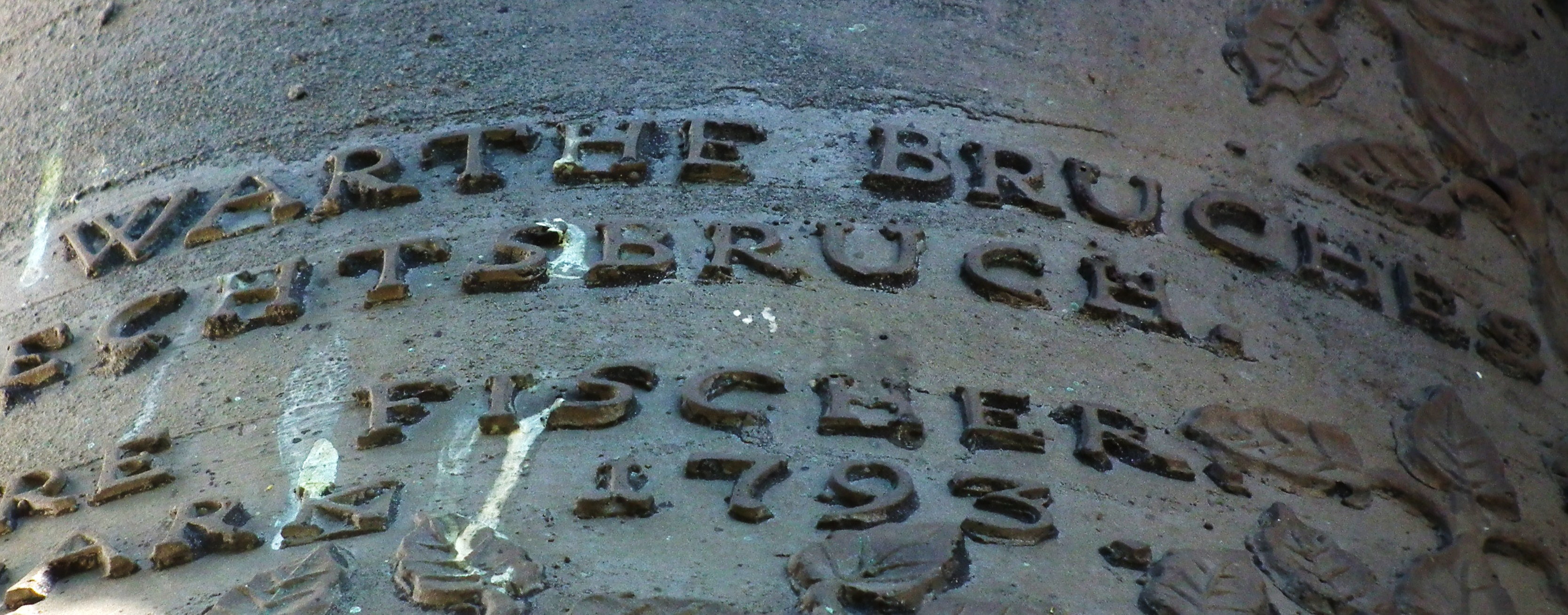 Kościół Niepokalanego Serca NMP w Studzionce.